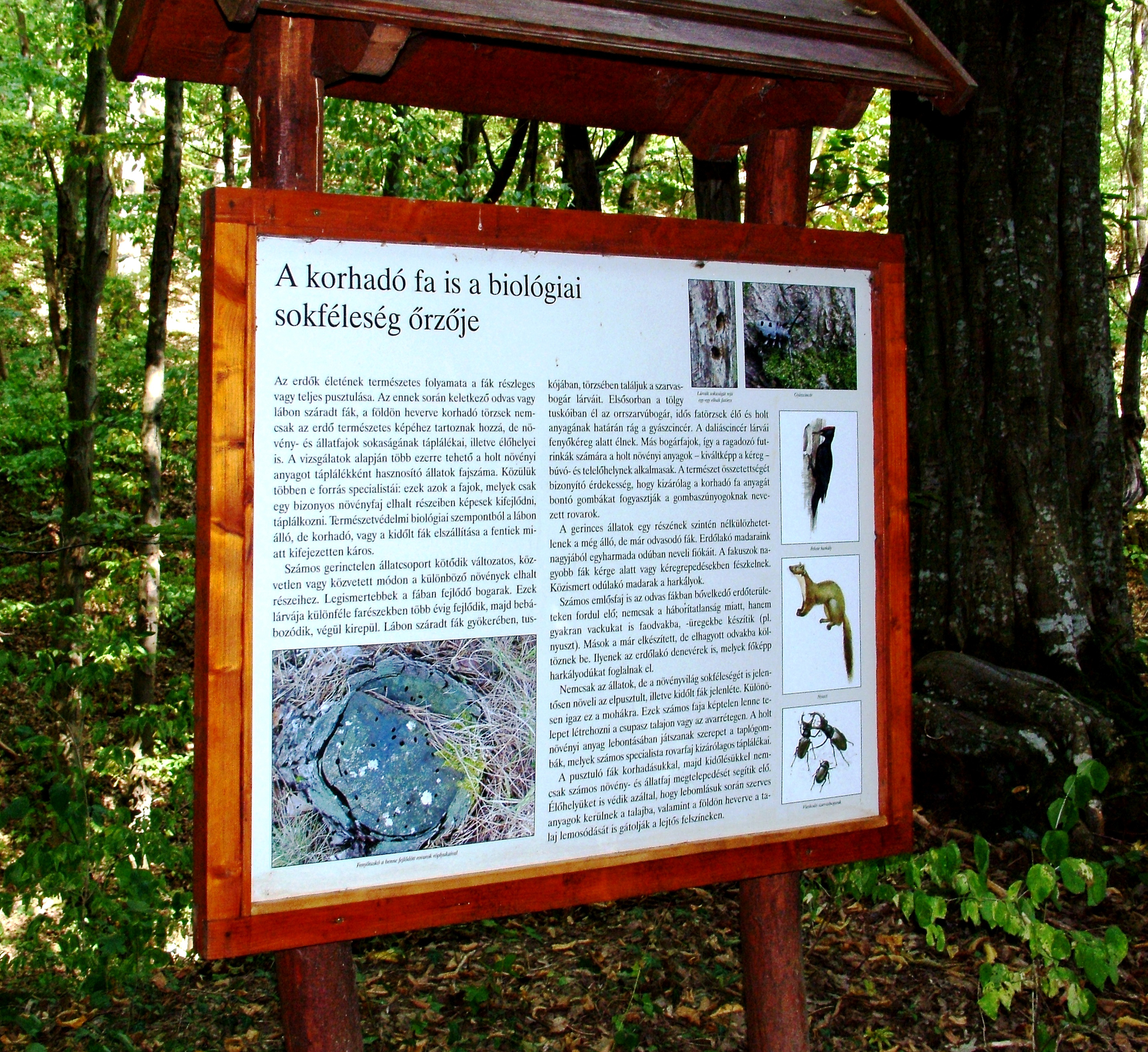 Koloska-völgyi tanösvény (Balatonfüred)